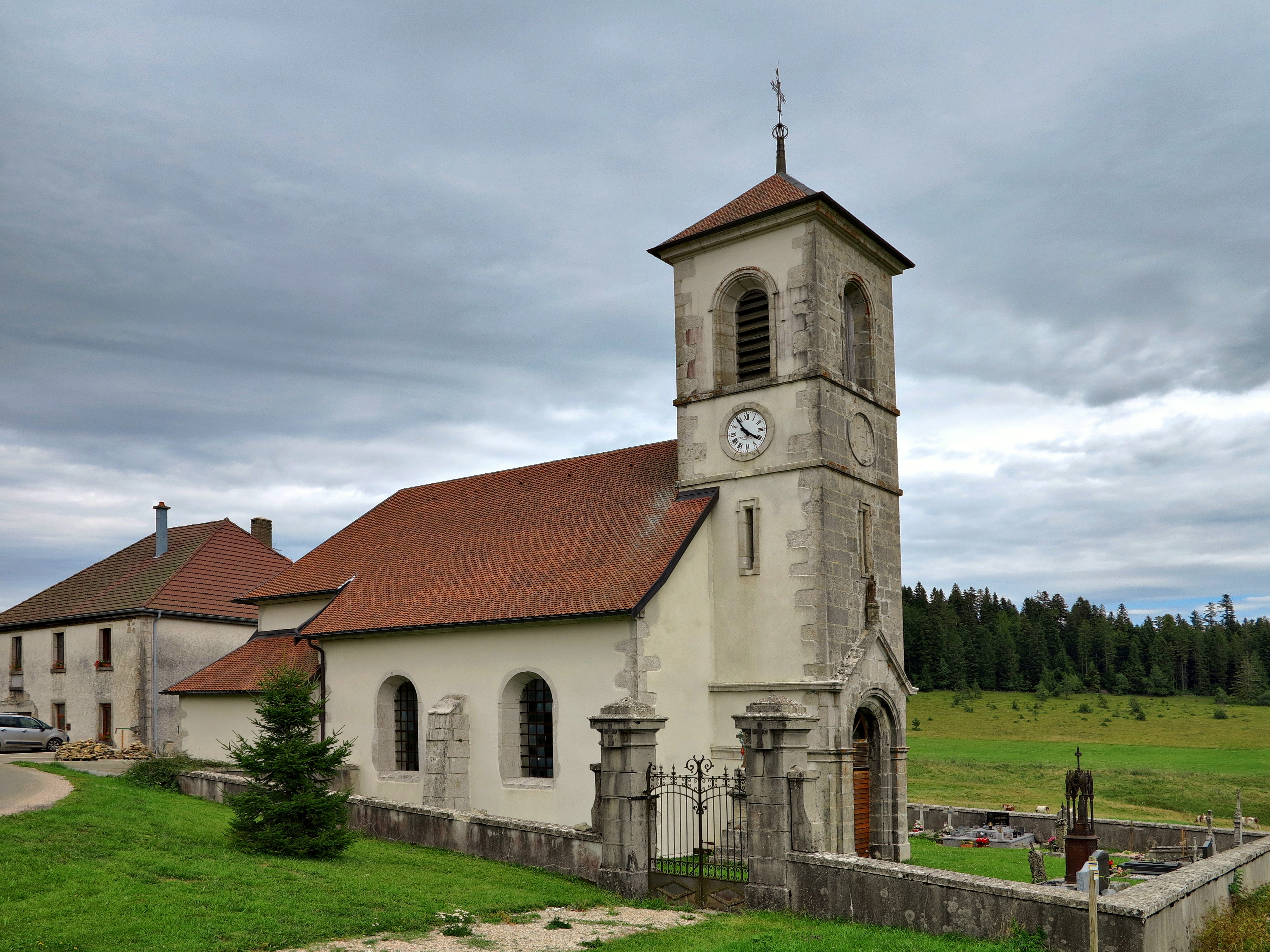 L'église